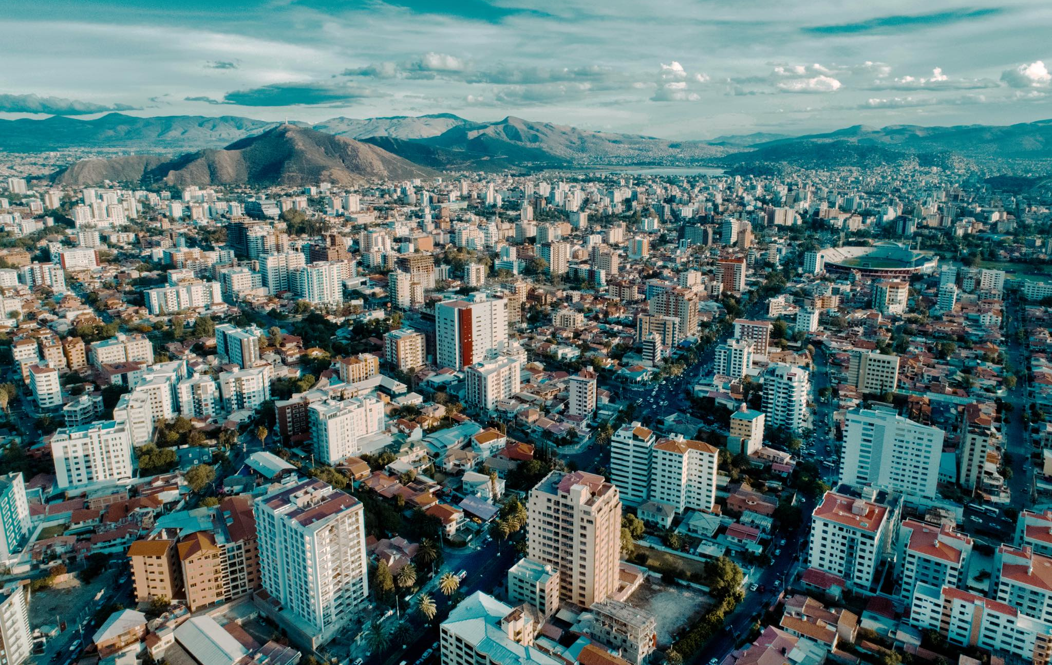 Vista Aerea de la Ciudad de Cochabamba